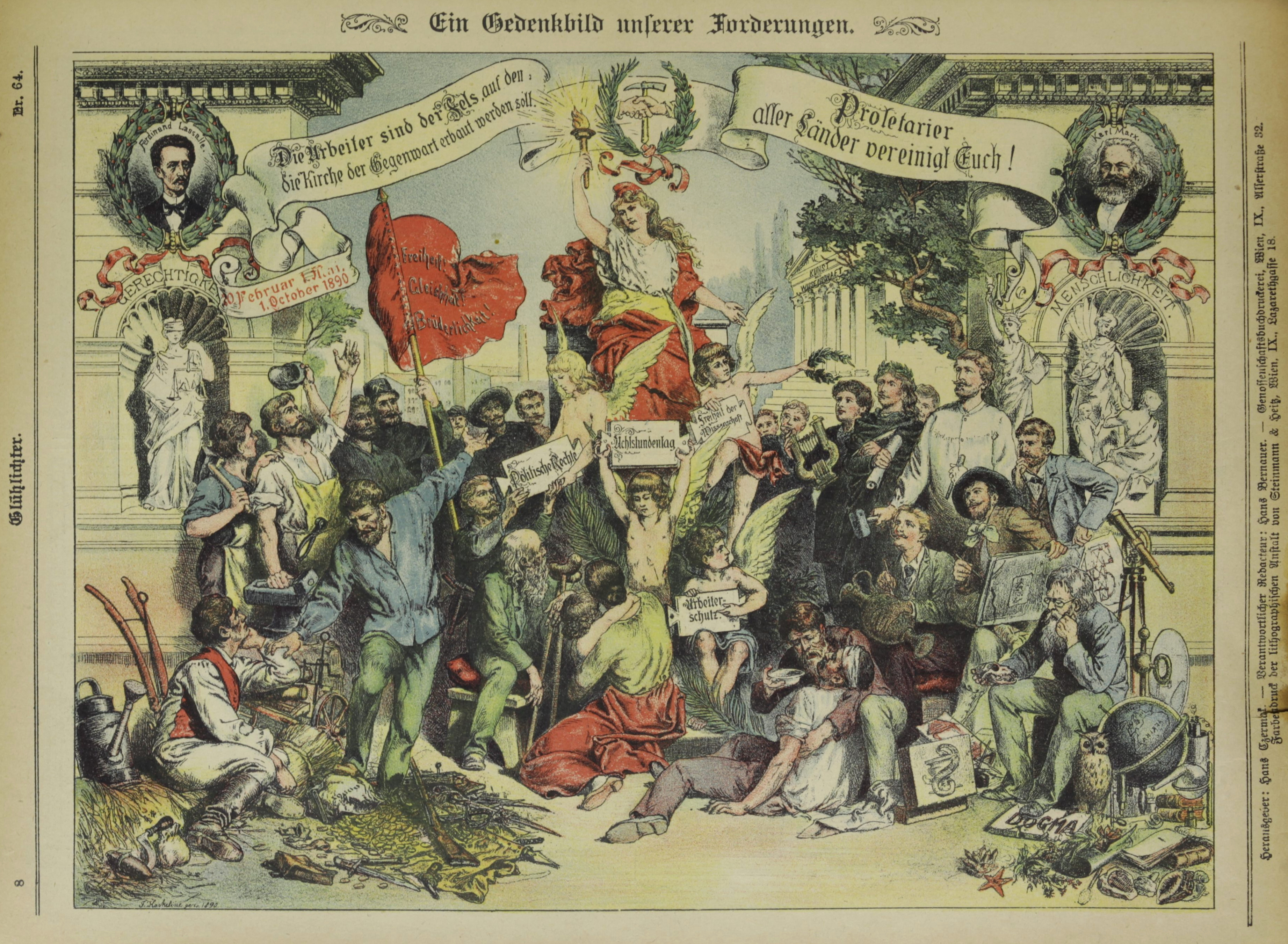 Bild Die Arbeiterbewegung 1890 von Friedrich Kaskeline, lt. Sig 1890, veröffentlicht in der satirischen Zeitschrift Die Glühlichter am 1. Mai 1892.